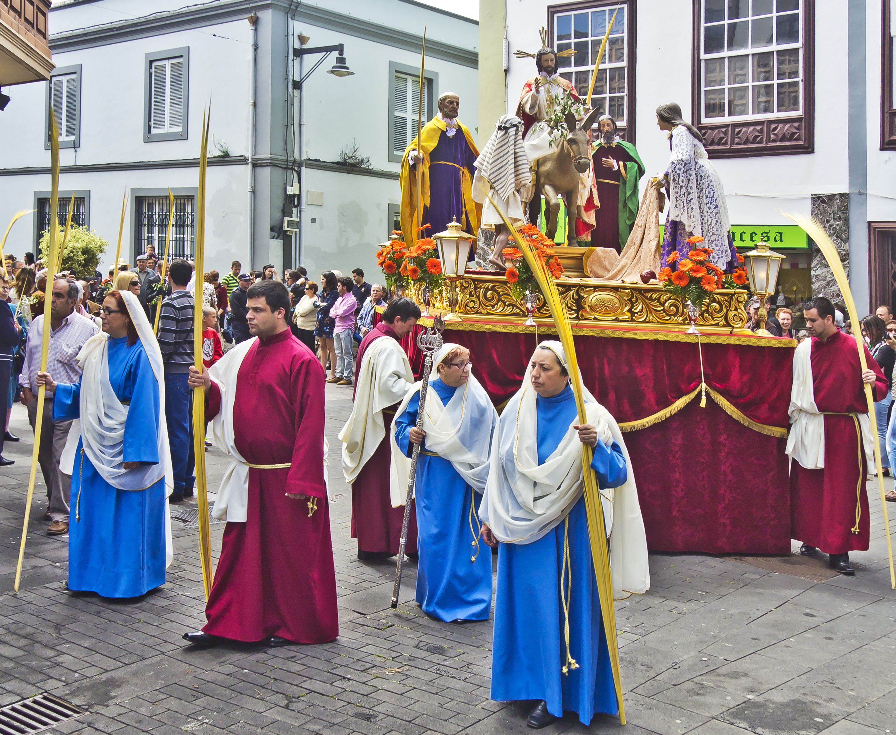 Procesión de la Entrada de Jesucristo a Jerusalén / Paso de la Entrada de Jesús en Jerusalén / Paso de la Entrada de Jesús en Jerusalén